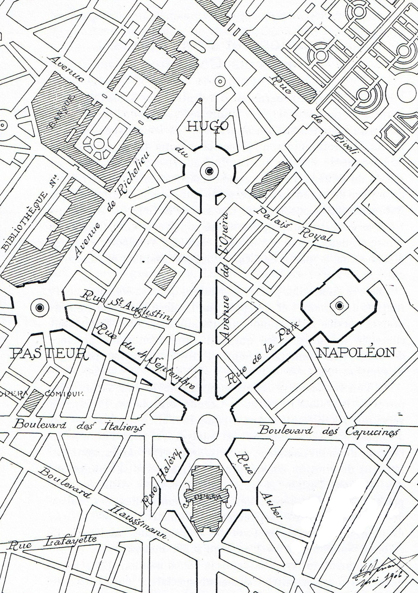 Plan de réaménagement de la place de l'Opéra